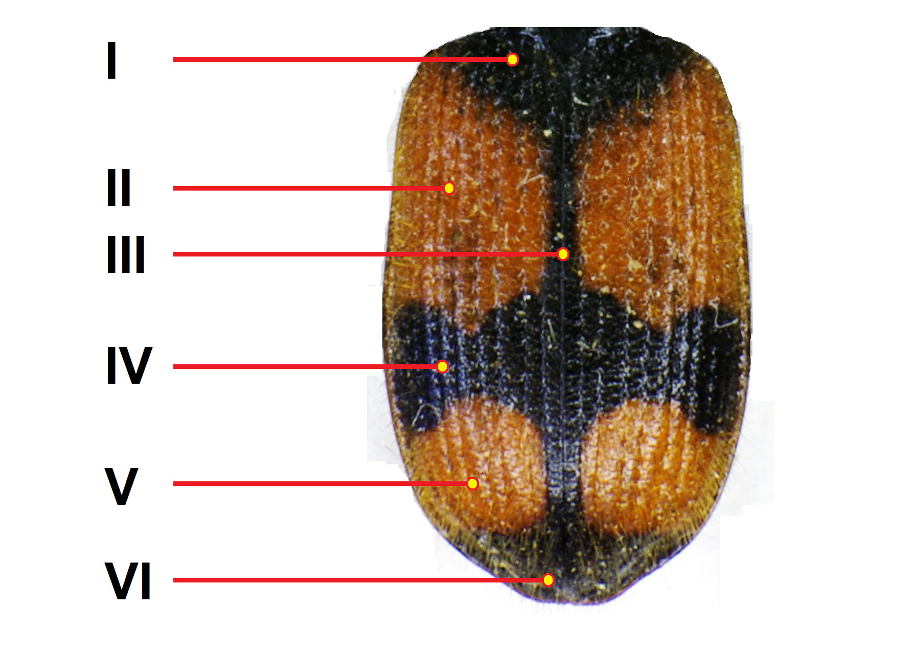 Panagaeus cruxmajor